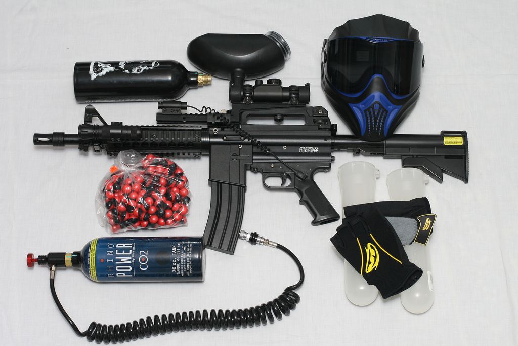 Paintball Gun and Equipment